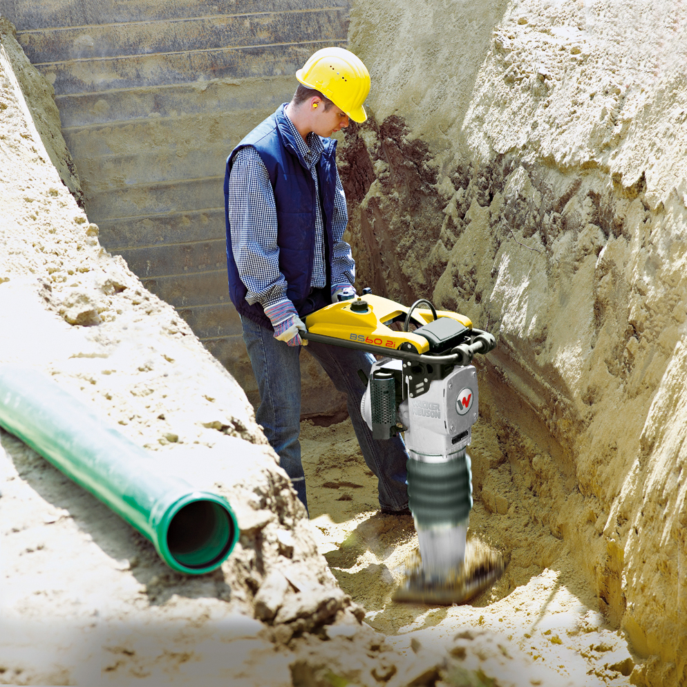 Wacker Neuson Stampfer BS 60-2i im Einsatz auf einer Baustelle